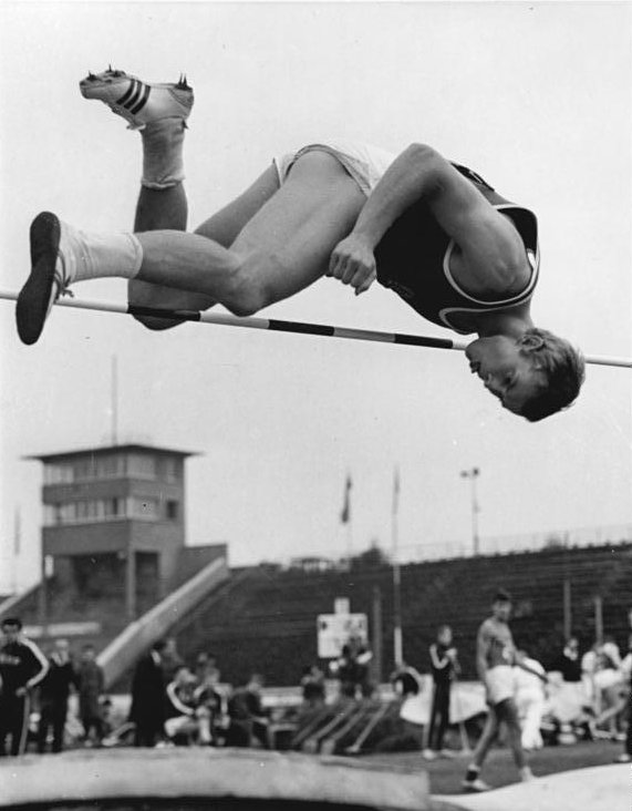 Max Klauß Zentralbild Ritter sche-bi. 9.10.1967 Spitzensportler der DDR - Dresden: Max Klauß, Junioren-Weltrekordler im Zehnkampf. Zu den erfolgreichsten DDR-Leichtathleten im vorolympischen Jahr zählt zweifellos der 20jährige Dresdener Einheit-Sportler Max Klauß. Bei den 18. Deutschen Meisterschaften der DDR 1967 in Halle schaffte er im Zehnkampf insgesamt 7986 Punkte, was gleichzeitig neuen DDR- und Junioren-Weltrekord bedeutete. Seine Leistungen während des Rekord-Zehnkampfes im Einzelnen: 100 m in 10,6; Weitsprung 7,73 m; Hochsprung 2,04 m; Kugelstoßen 14,43 m; 400 m 49,4; 110 m Hürden 16,1; Diskuswerfen 45,44 m; Stabhochsprung 4,60 m; Speerwerfen 49,90 m; 1 500 m 4:33,8 min. Beim Zehnkampf-Länderkampf gegen die UdSSR am 16.-17.9.67 in Magdeburg verbesserte er seine Speerwurfleistung auf 58,16 m. (Achtung Redaktionen! Verwenden Sie auch bitte Foto Nr.: F1009-02-1N, F1009-03-1N, F1009-04-1N, F1009-05-1N)